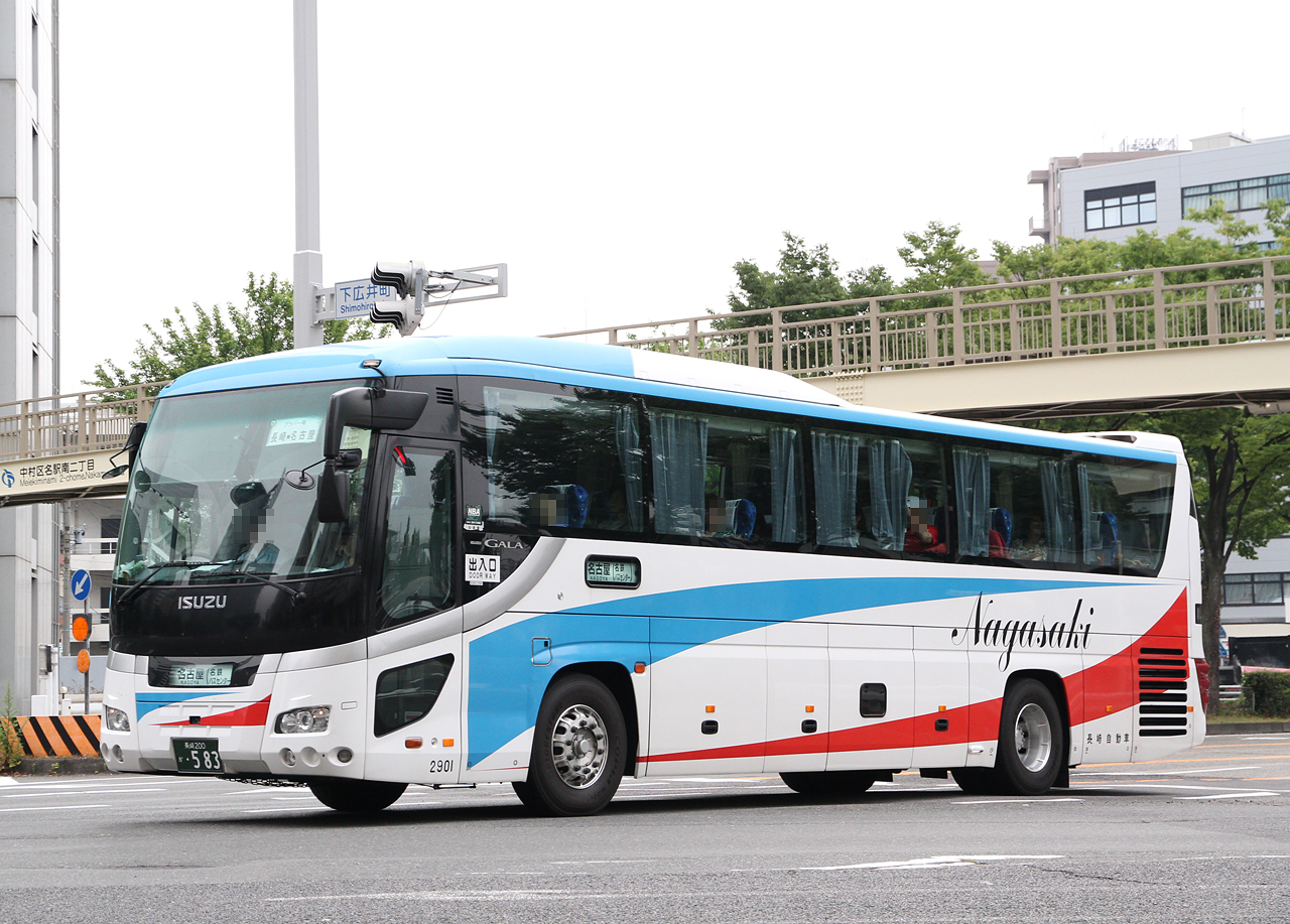 ・登録番号 長崎200か･583 ・社番：2901 ・長崎自動車㈱松ヶ枝営業所所属 ・夜行高速路線用車両 ・2014年6月21日 名古屋市中区にて撮影 ・撮影者 Zondag2000